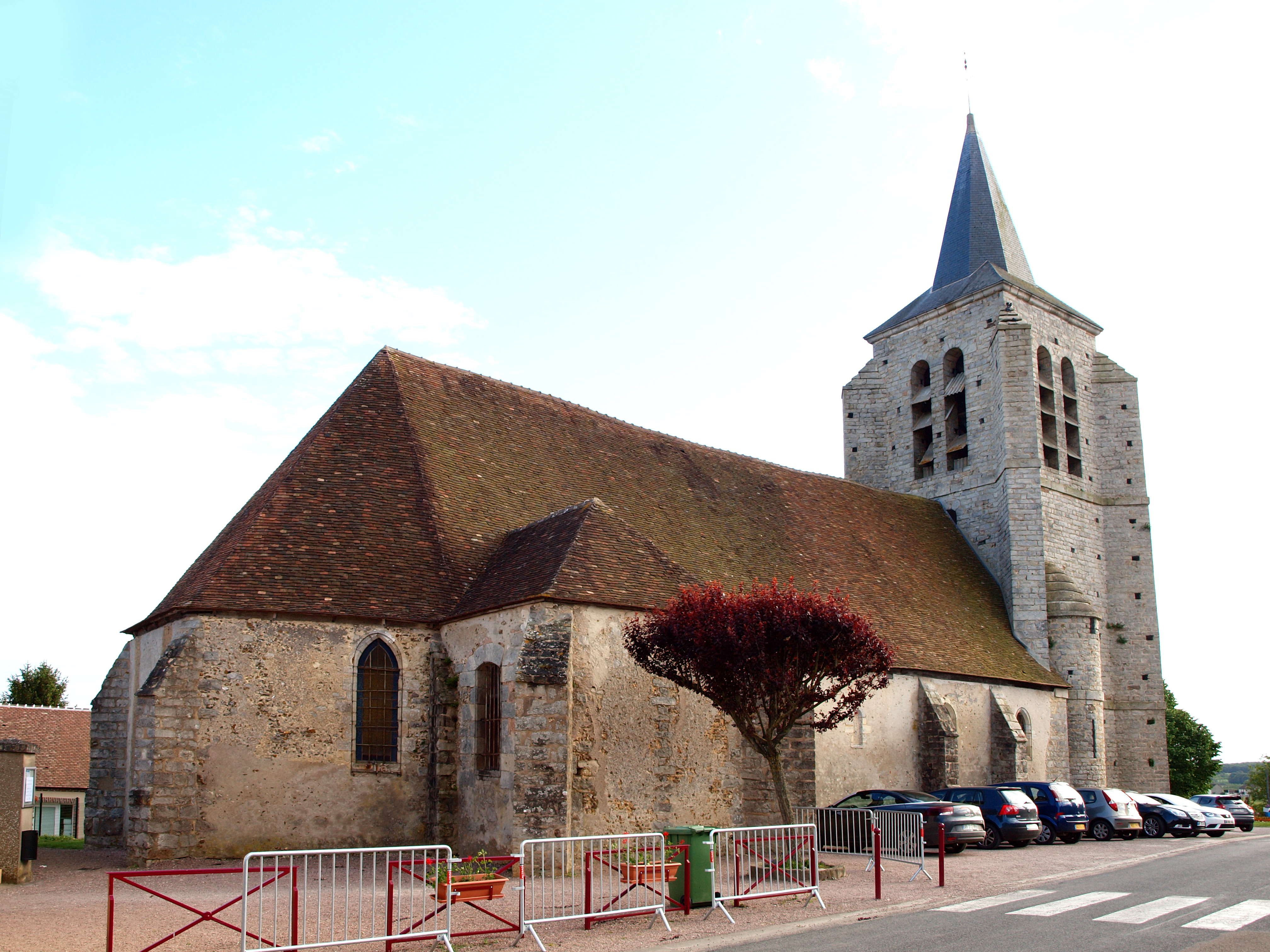 Église Saint-Louis de Chaumot (Yonne, France)